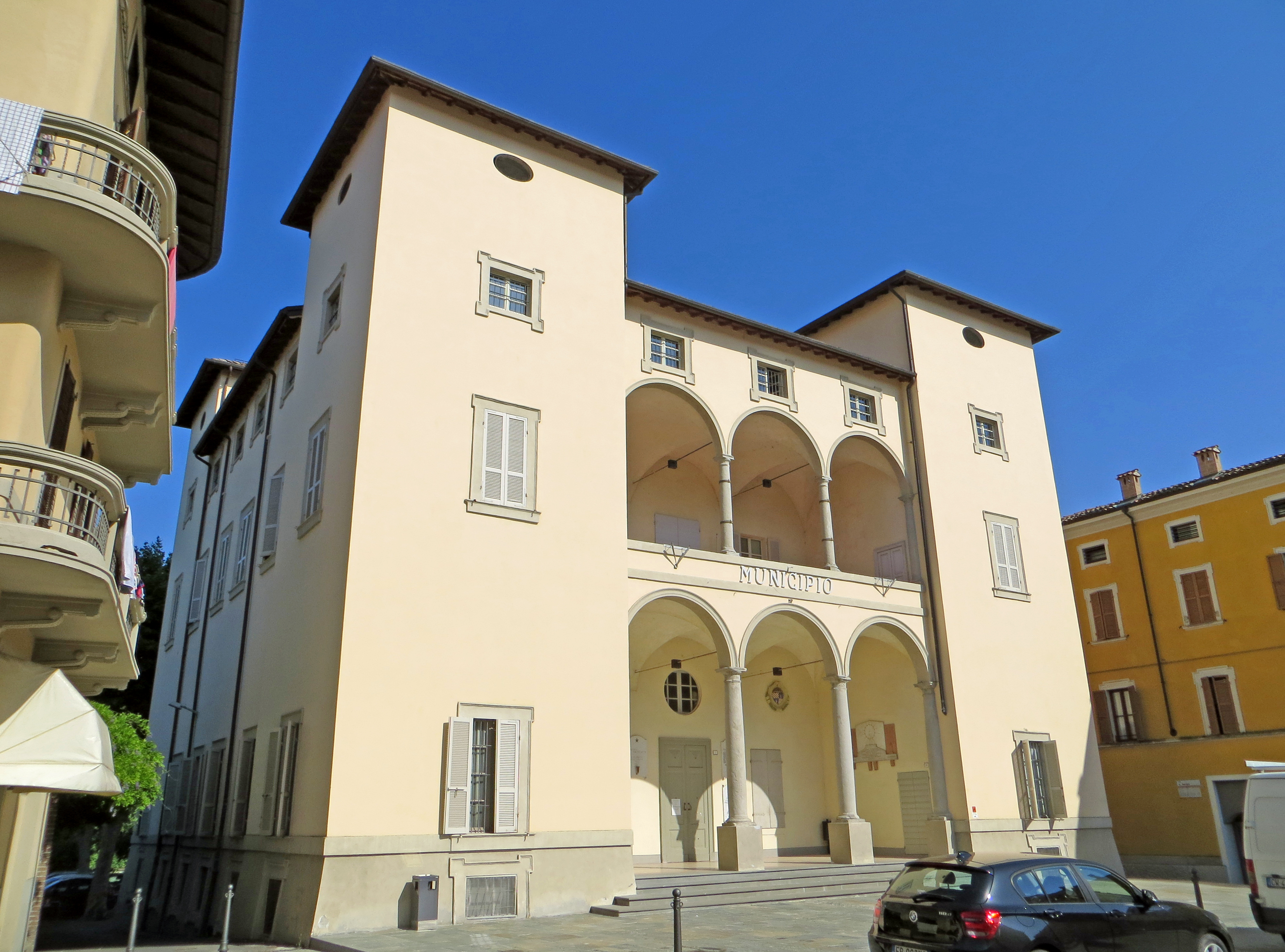 Palazzo Comunale (Langhirano) - facciata e lato nord